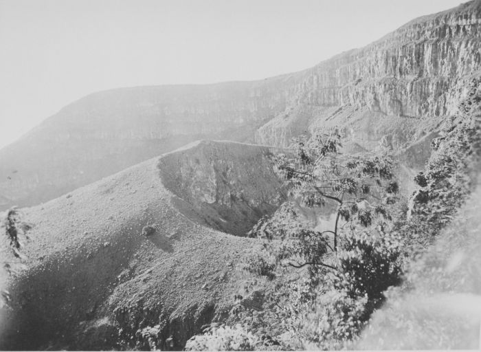 Foto. De krater van de vulkaan Gunung Gede